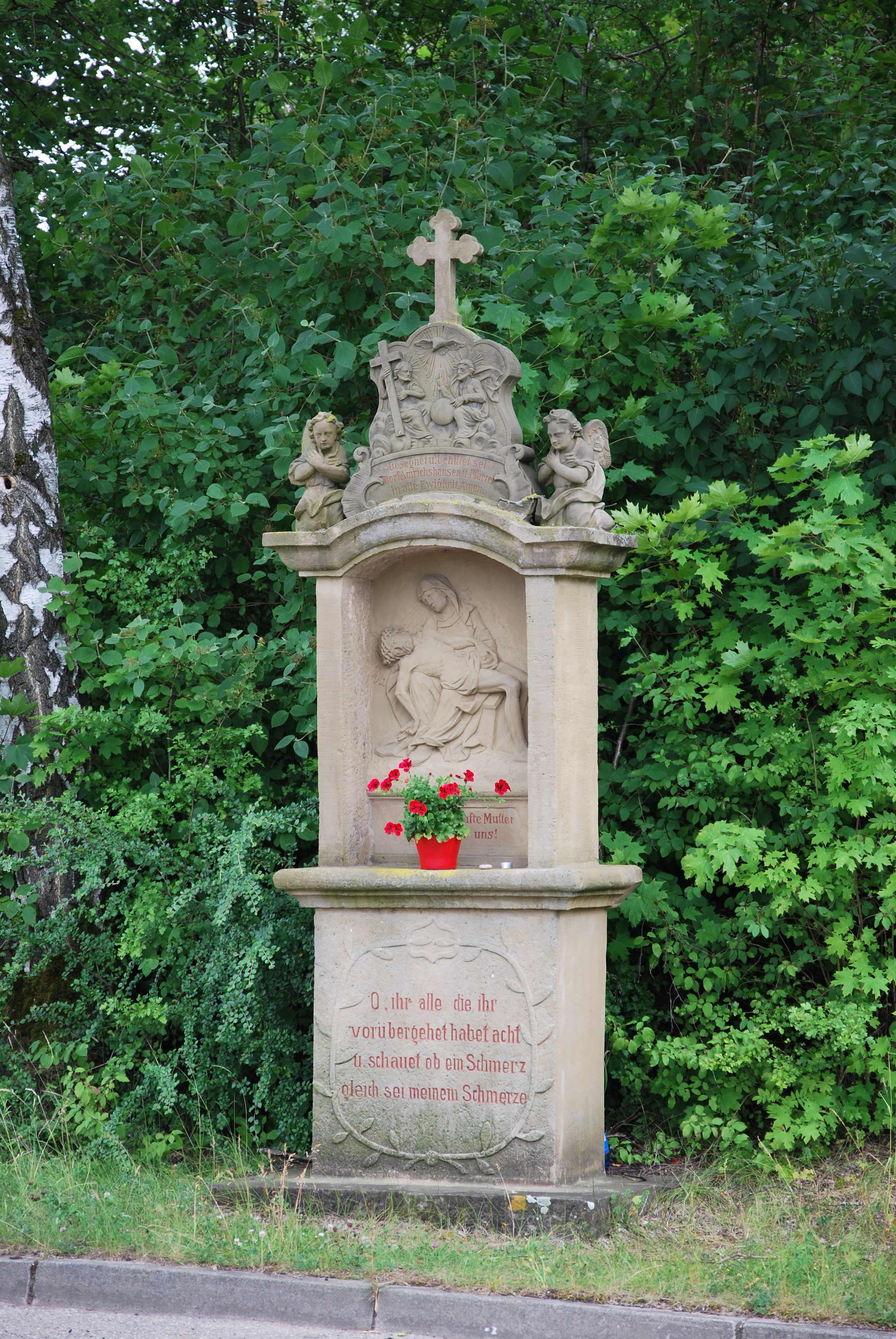 Bildstock in Künzelsau-Amrichshausen an der Gabelung Bildstockweg-Betzenweg.